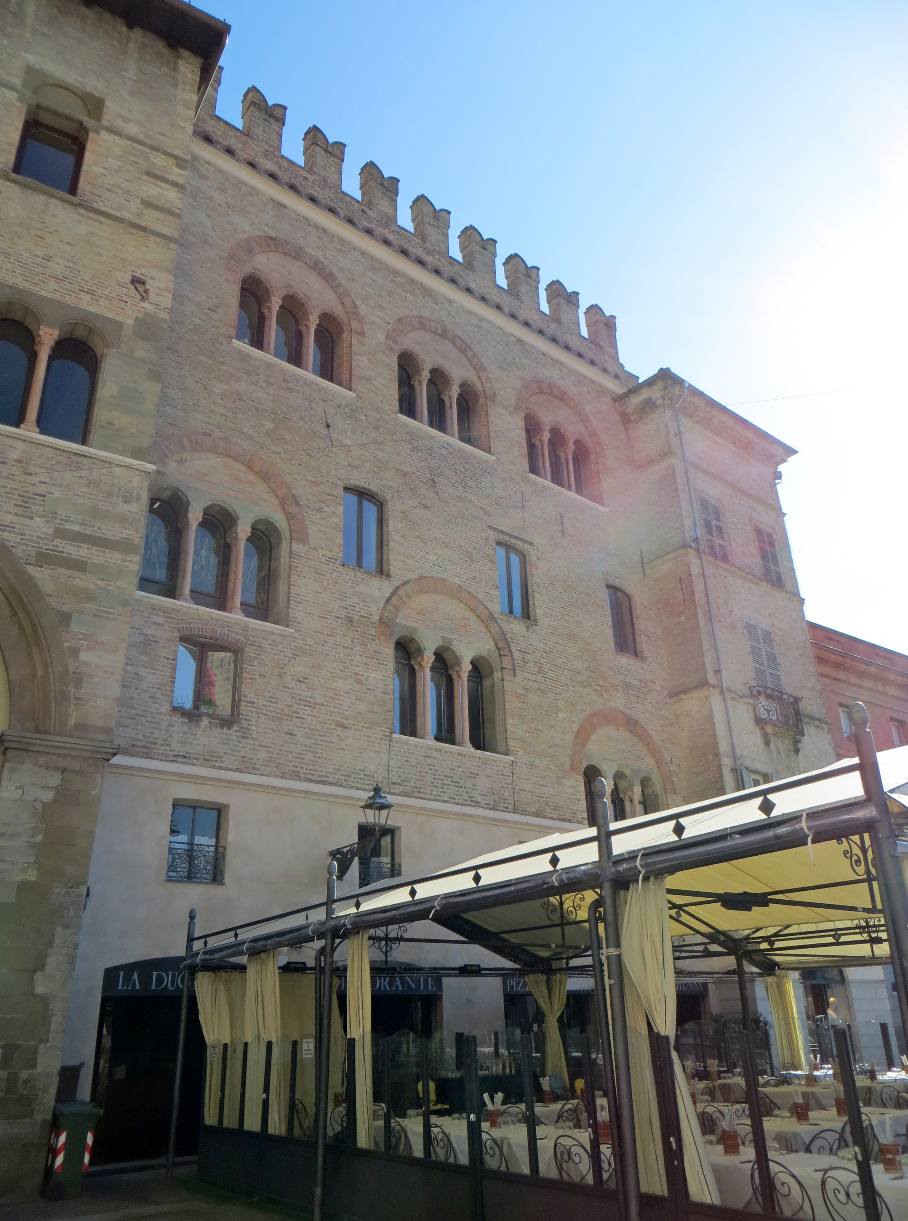 Palazzo del Podestà (Parma) - facciata